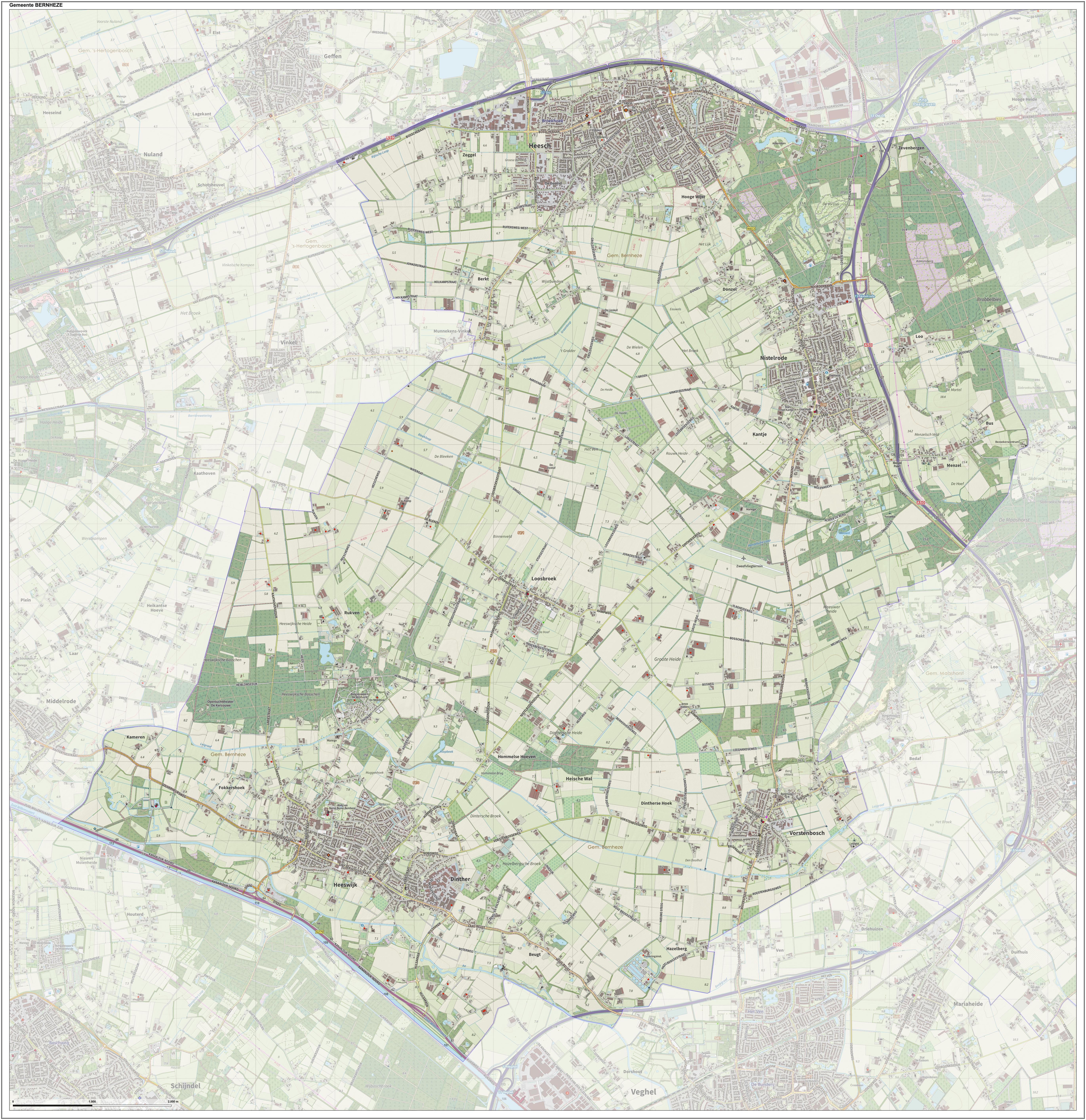 Topografische gemeentekaart. Resolutie: 400 pixels/km. Kaartbeeld samengesteld uit de open geodata van de Top10NL en Top25namen (Kadaster), Creative Commons-BY licentie. Gebouwvlakken uit open geodata BAG extract. Wegen uit de OpenStreetMap, OpenStreetMap community. Reliëfschaduw uit de Actuele Hoogtekaart AHN2. Samenstelling en kleurenschema: Jan-Willem van Aalst, met QGIS. Zie ook de Legenda.